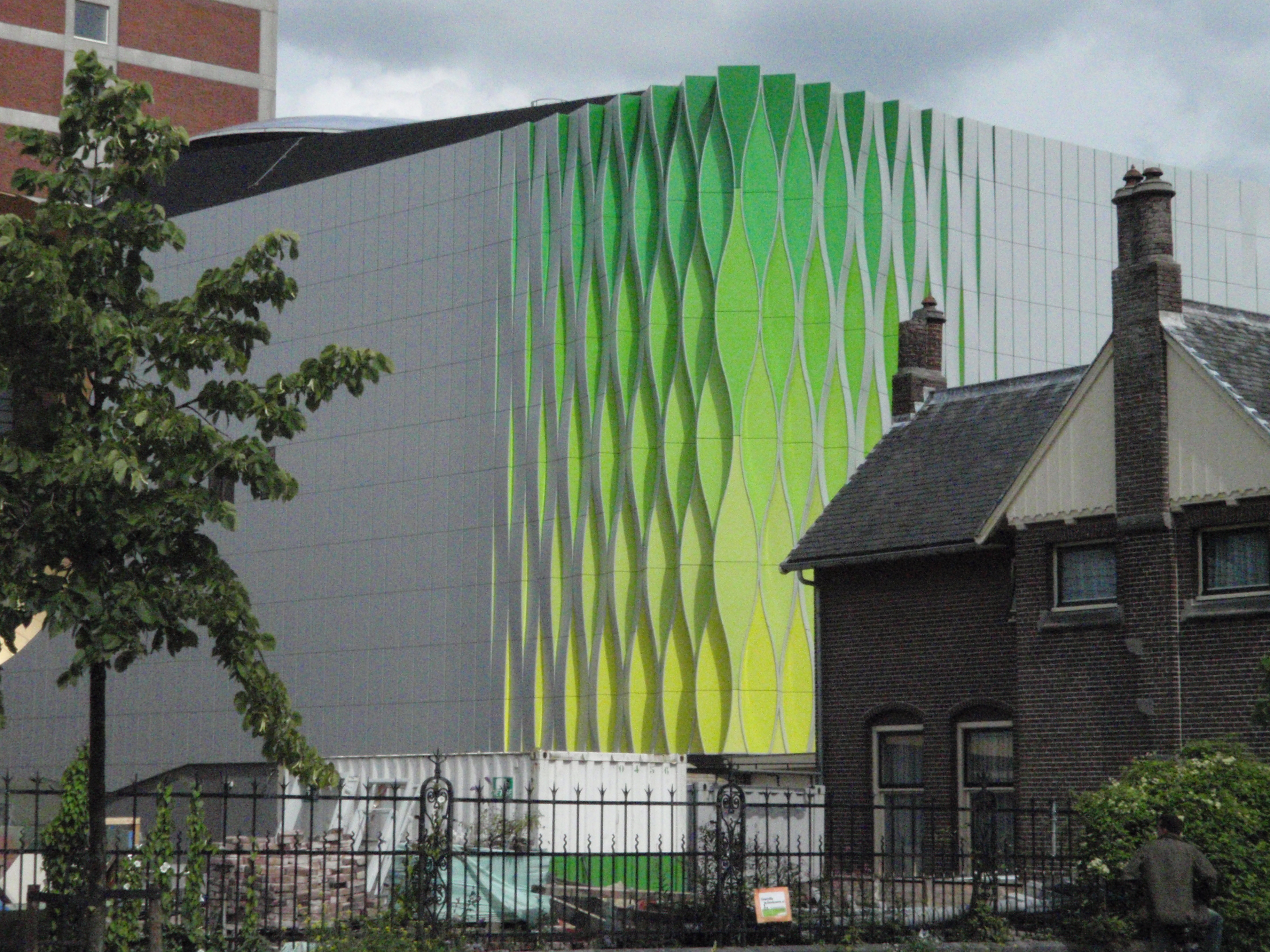 Het centraal dierenlaboratorium (CDL) op het terrein van het Universitair Medisch Centrum Groningen